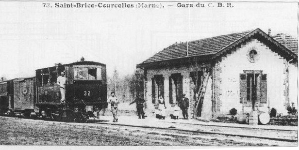 un bâtiment de _T4 de la CBR en gare de St-Brice_Courcelles, locomotive n° 32.